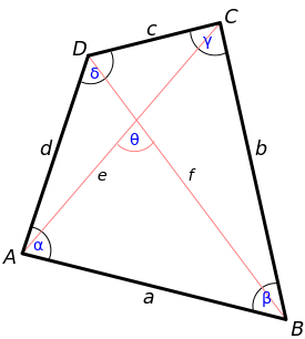 Ejemplo de Cuadrilátero